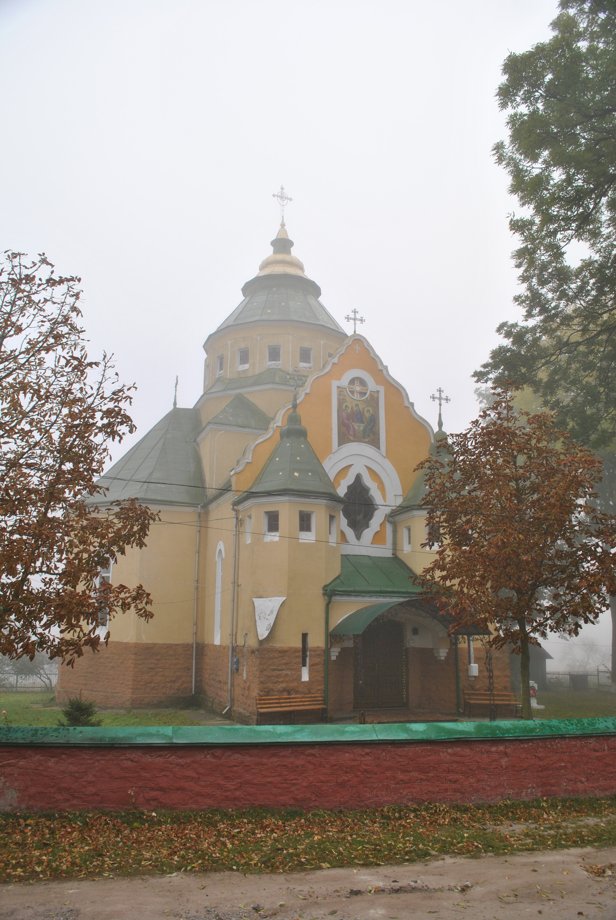 Церква Святої Трійці (мур.) у селі Пишківці Бучацького району Тернопільської області.